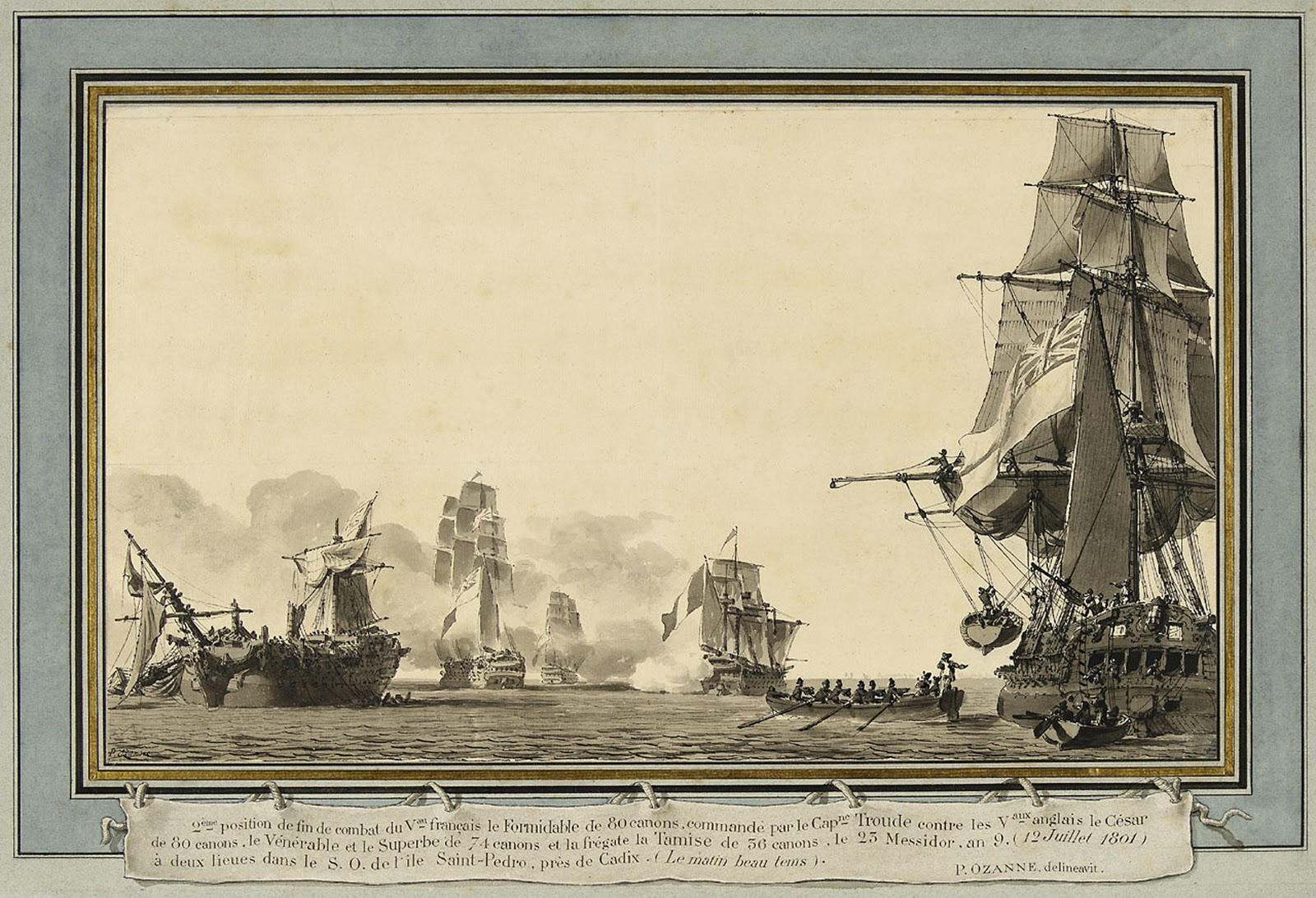 Dessin de Pierre Ozanne. A gauche : le HMS Venerable démâté secouru par un navire anglais, sans doute la frégate Tamise. Au fond, de dos, le Formidable de 80 canons qui vient de mettre hors de combat le vaisseau anglais et qui tire encore.